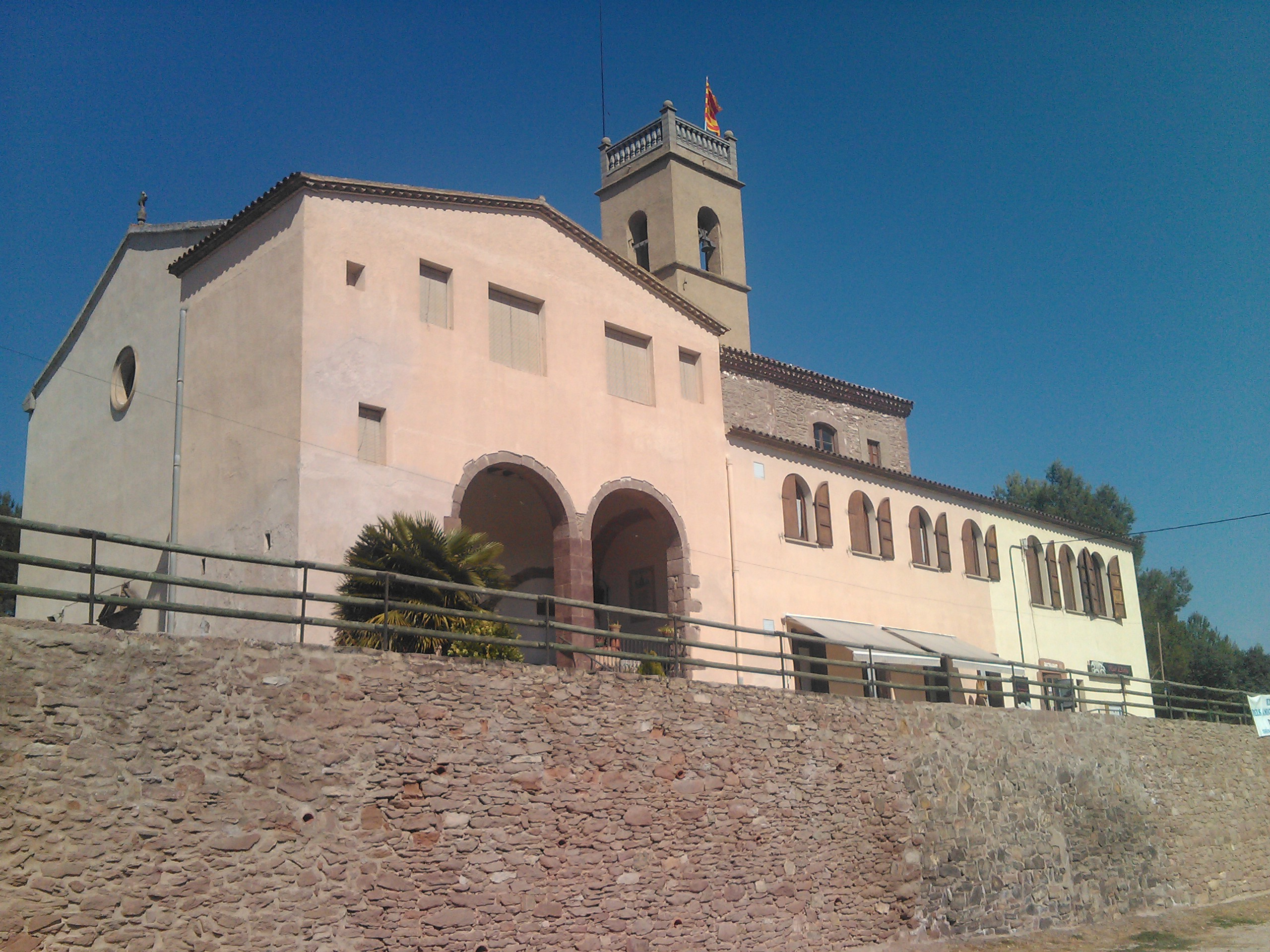 Santuari de Joncadella (Sant Joan de Vilatorrada, Bages, Catalunya)